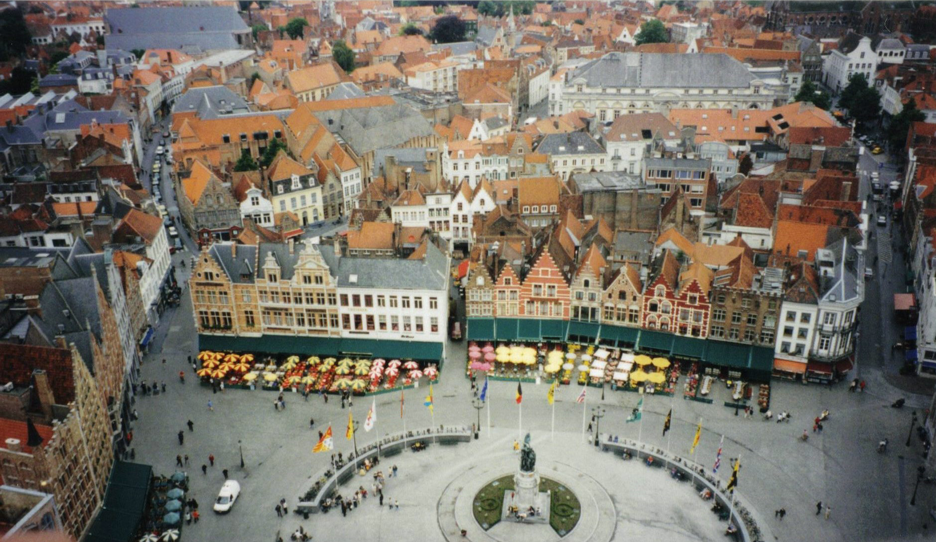 Bruges, Belgio.